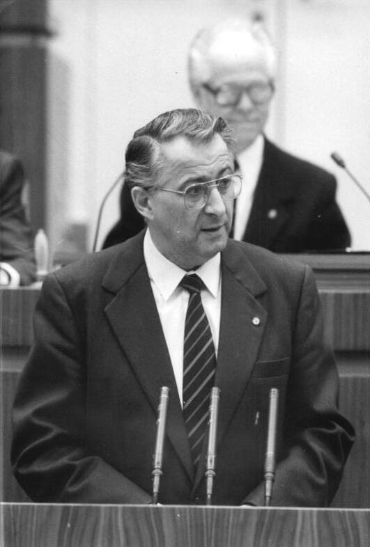 ADN-ZB Lehmann 18.11.1989 - Berlin: VK-Tagung Die oberste Volksvertretung der DDR setzte im Plenarsaal des Palastes der Republik ihre 12. Tagung fort. Nach der Wahl des Ministerrates gab der Generalstaatsanwalt, Günter Wendland, einen Bericht über die bisherigen Ermittlungsergebnisse zu Übergriffen der Sicherheitsorgane am 7. und 8. Oktober.